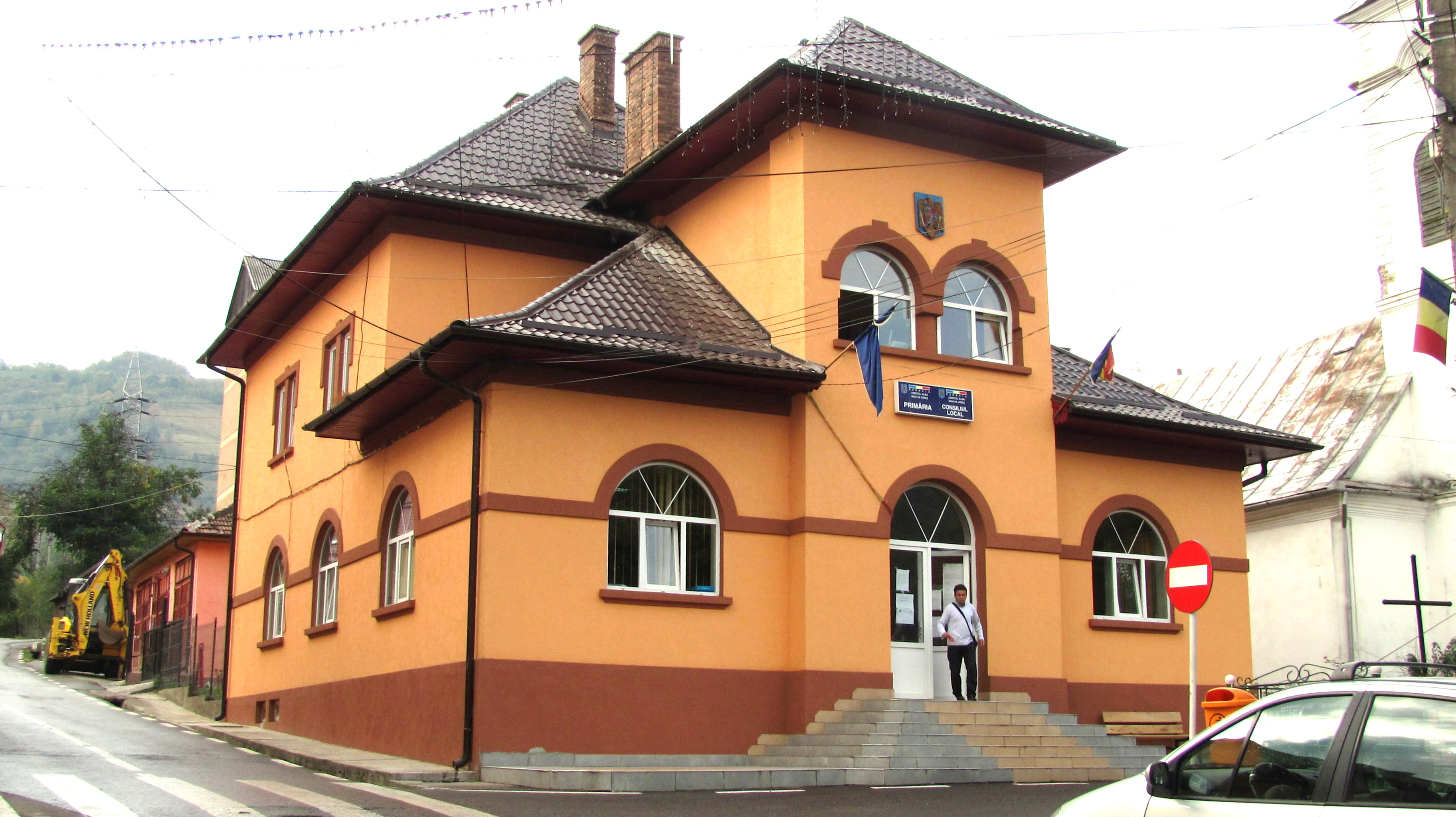 Baia de Arieş - Primăria oraşului, Piaţa Băii, nr. 1